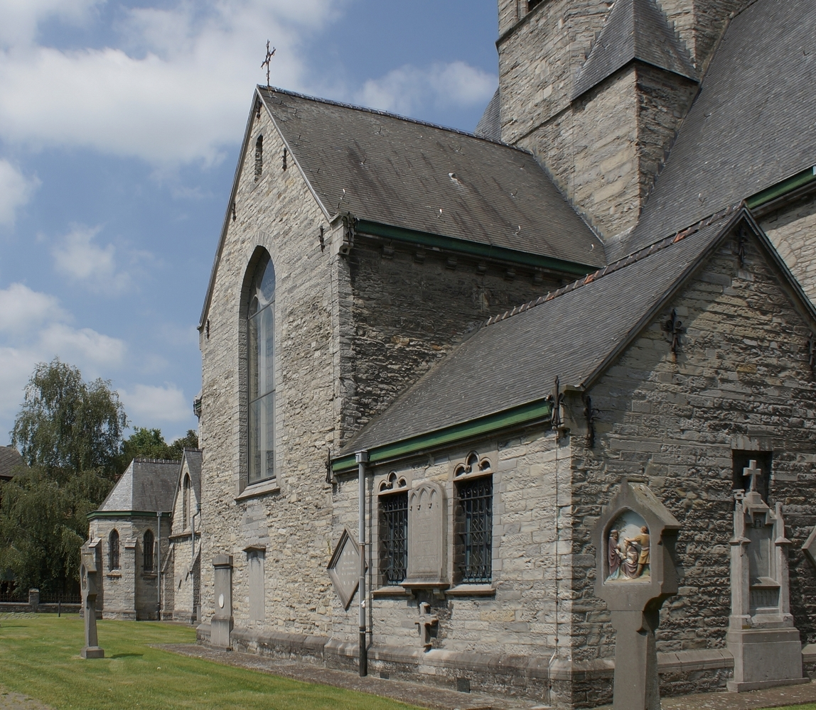 OLV Geboortekerk (Mariakerke) - Zuidelijke gevel met op de voorgrond de sacristie en Sint-Corneliusommegang.